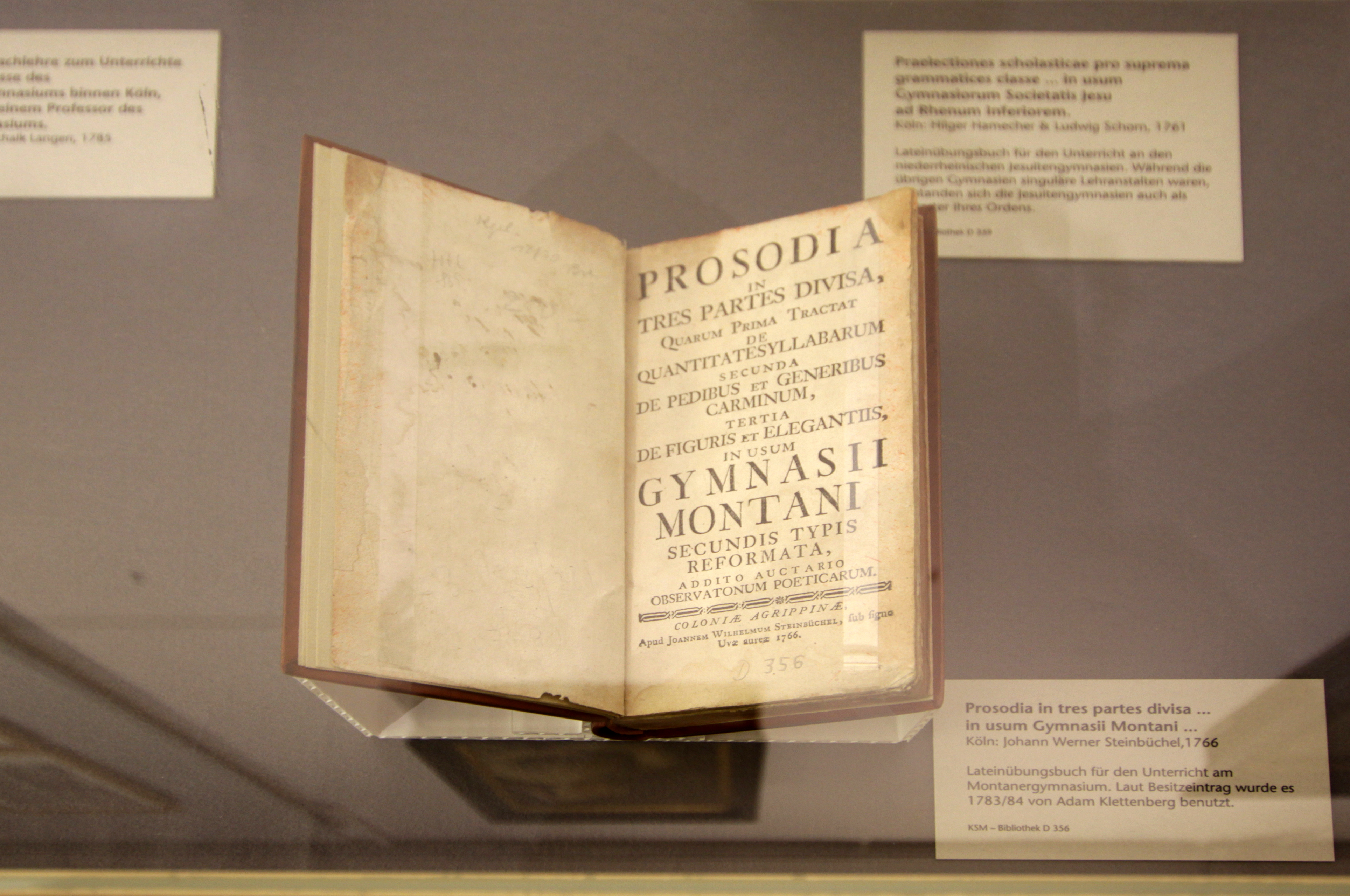 Köln, Gymnasium Montanum. Lehrbuch für denLateinunterricht im Jahr 1766